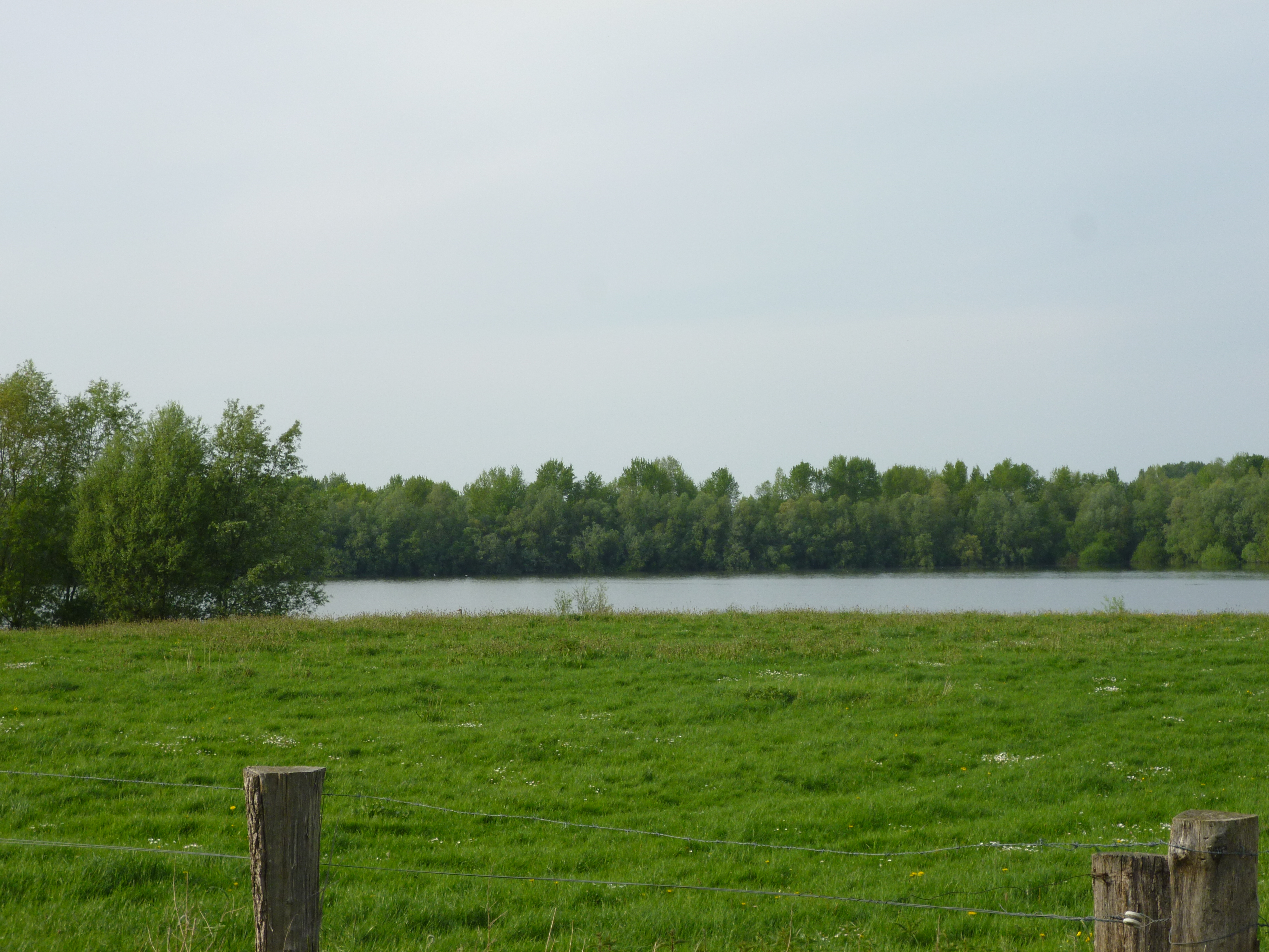 Blick zum ehemaligen Baggersee im FFH-Gebiet DE-4305-303 „Rheinvorland bei Perrich“, Teilfläche des Naturschutzgebiets „Rheinaue zwischen Büderich und Perrich“ in der Nähe des Pavershofs; Wesel